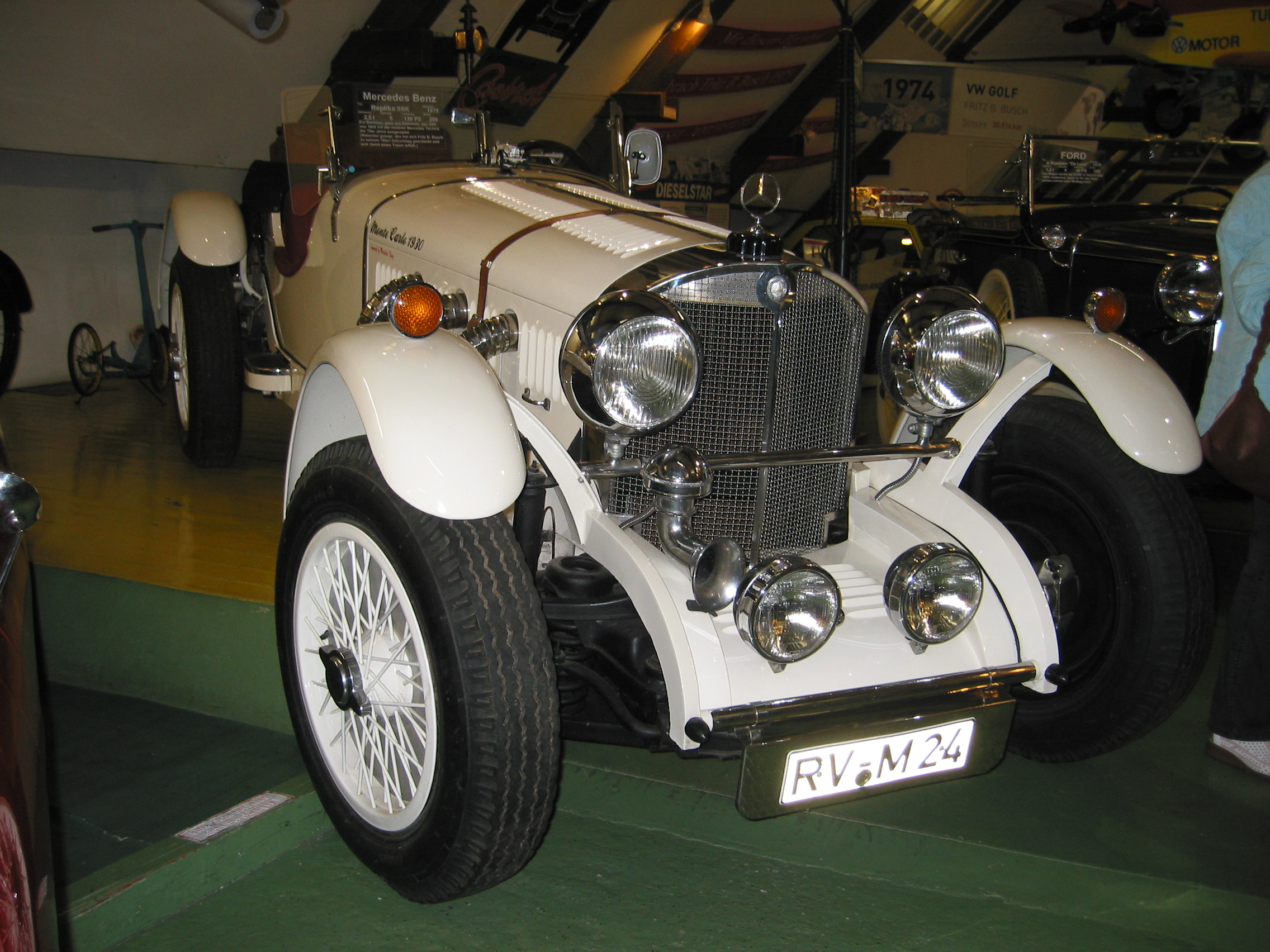 Torrelaro Roadster